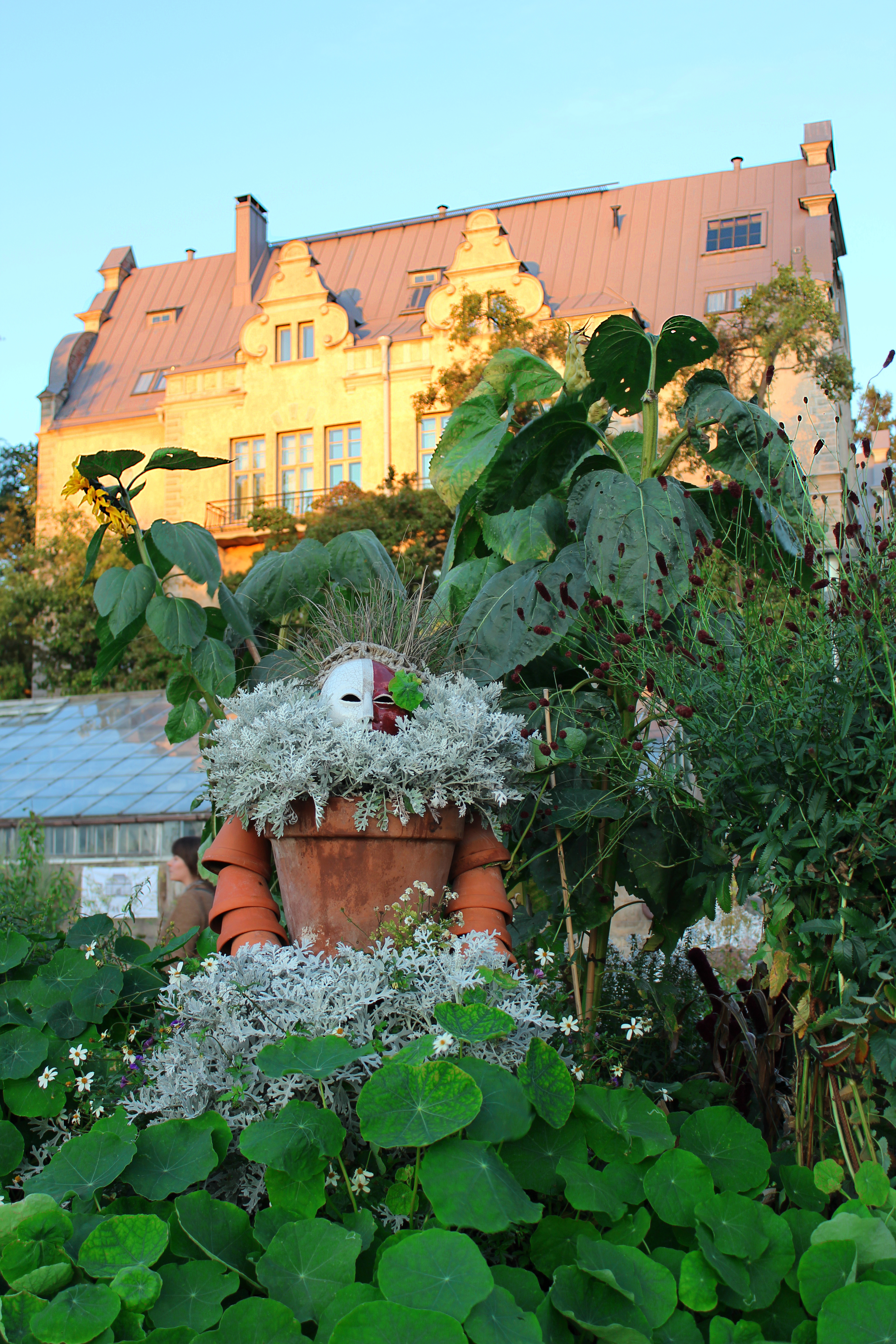 Helsingin yliopiston kasvitieteellisen puutarhan uudistettu ulkopuutarha. Taustalla Kasvimuseo.